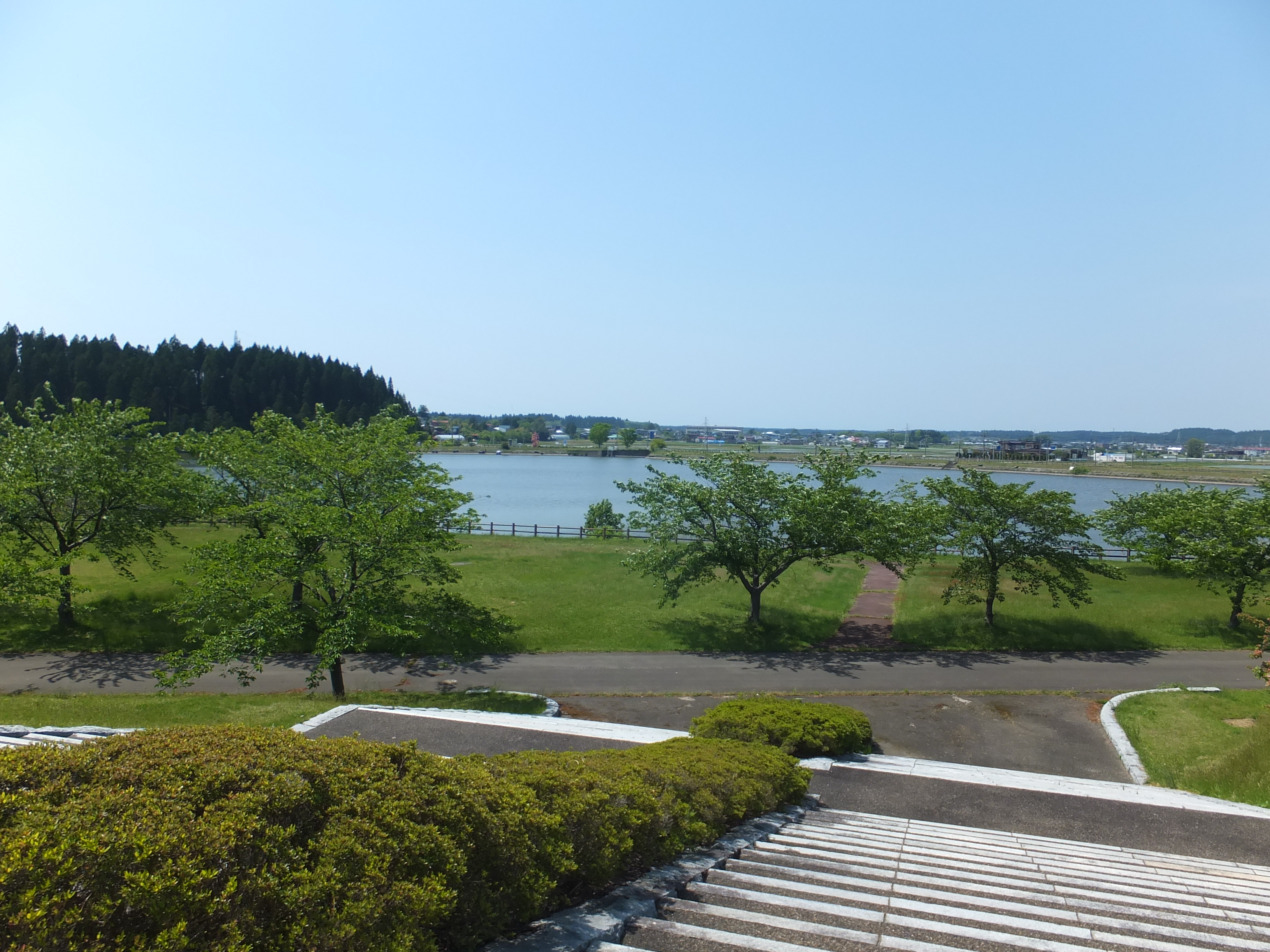 森岳温泉に隣接する惣三郎沼公園（秋田県山本郡三種町）。へらぶな釣りの名所として知られる。